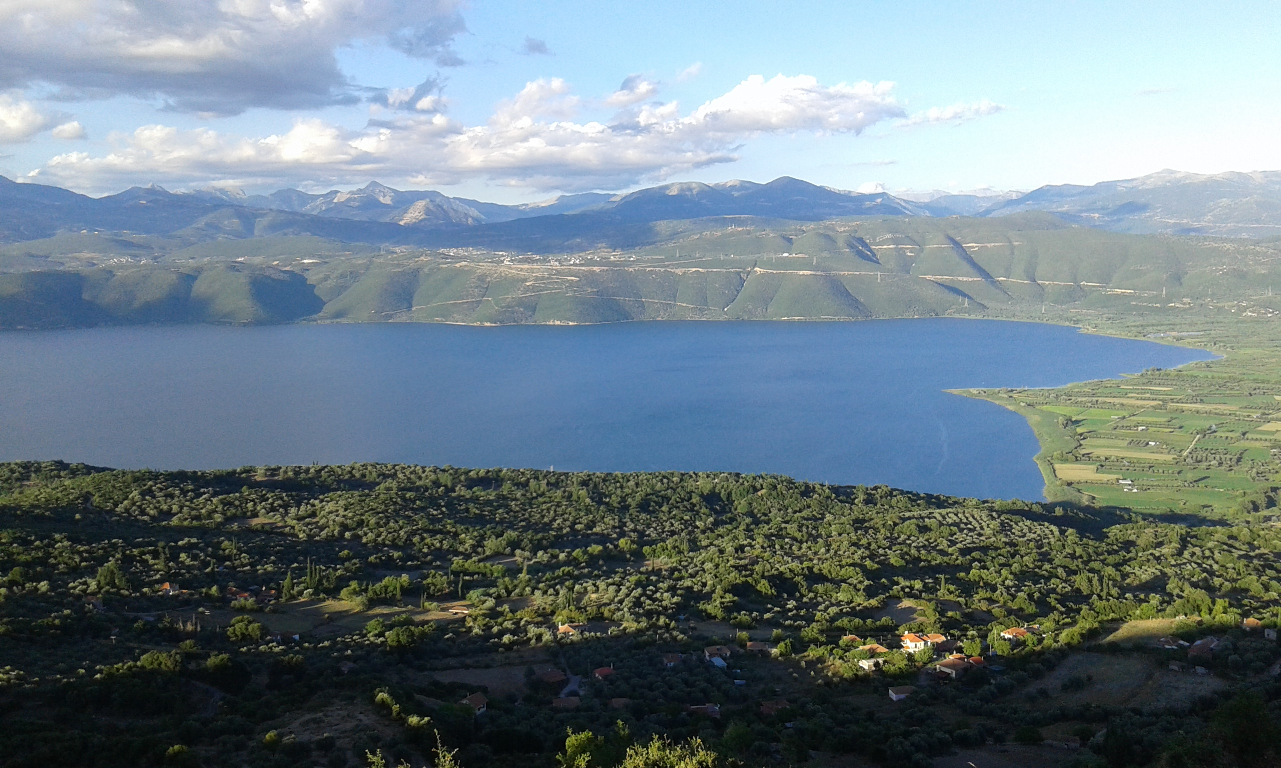 Θέα από την λίμνη Τριχωνίδα, Αιτωλοακαρνανία This is a photography of Natura 2000 protected area with ID GR2310009